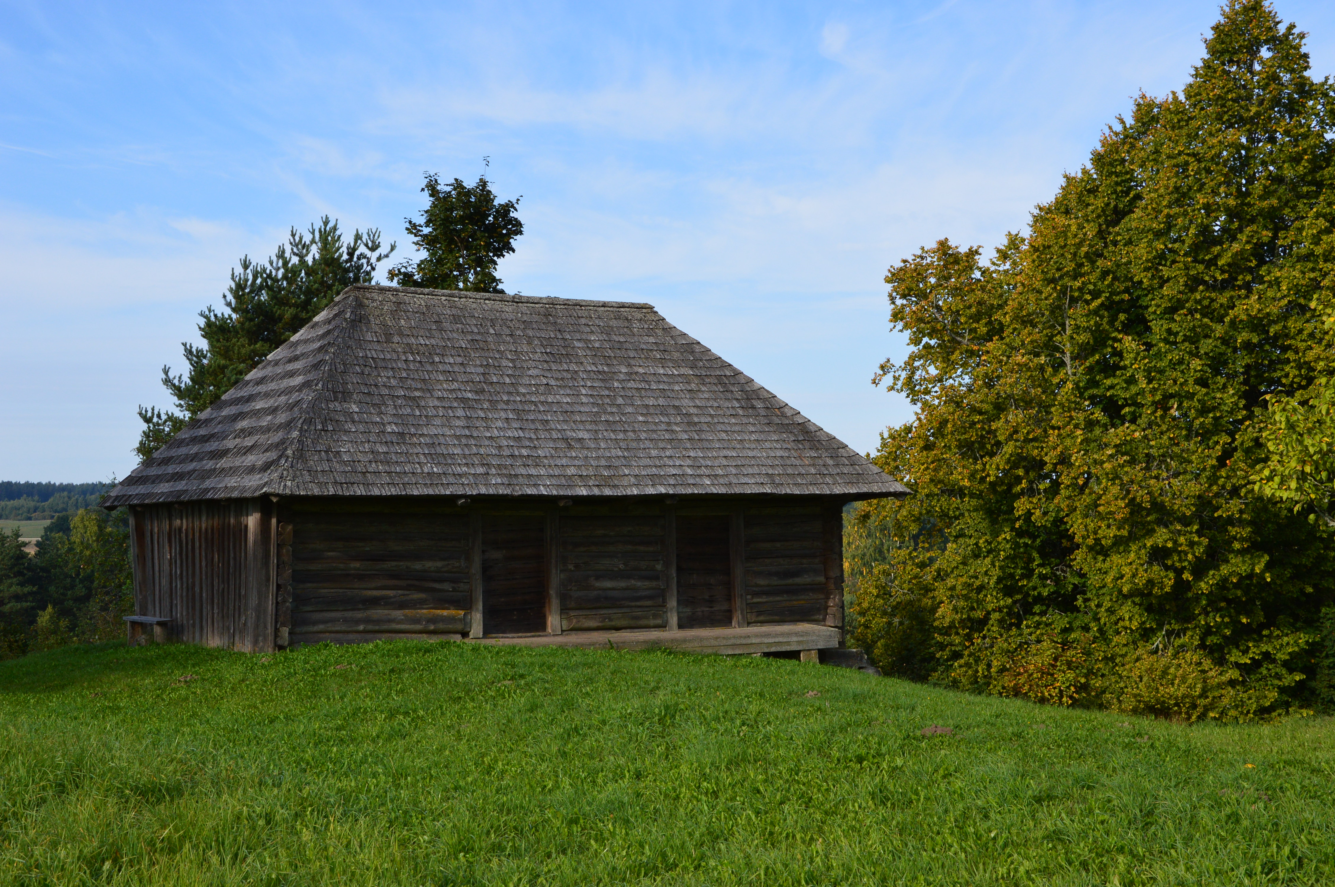 Hinni talu ait